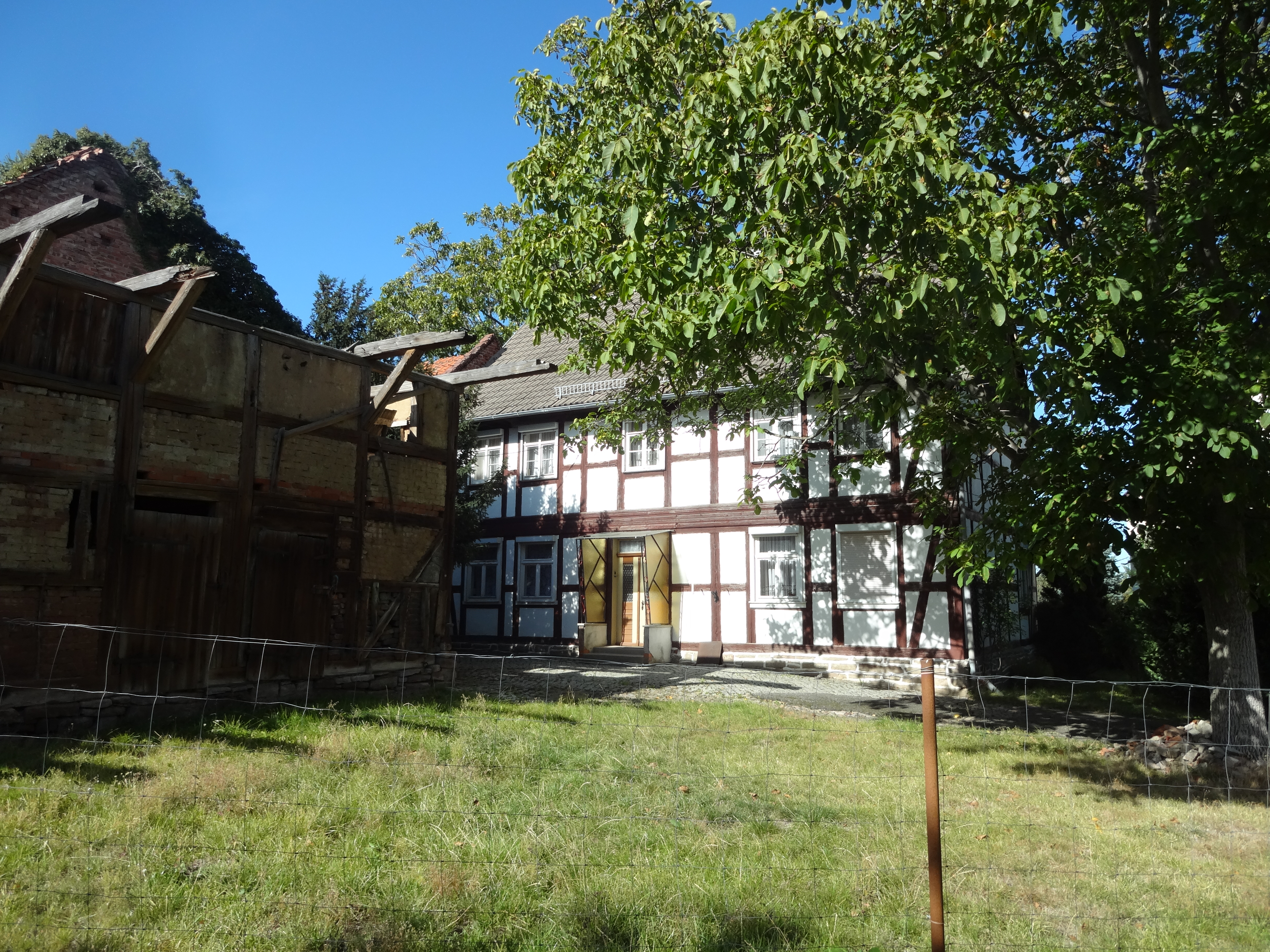 denkmalgeschützter Bauernhof in der Backhausgasse 4 in Drübeck